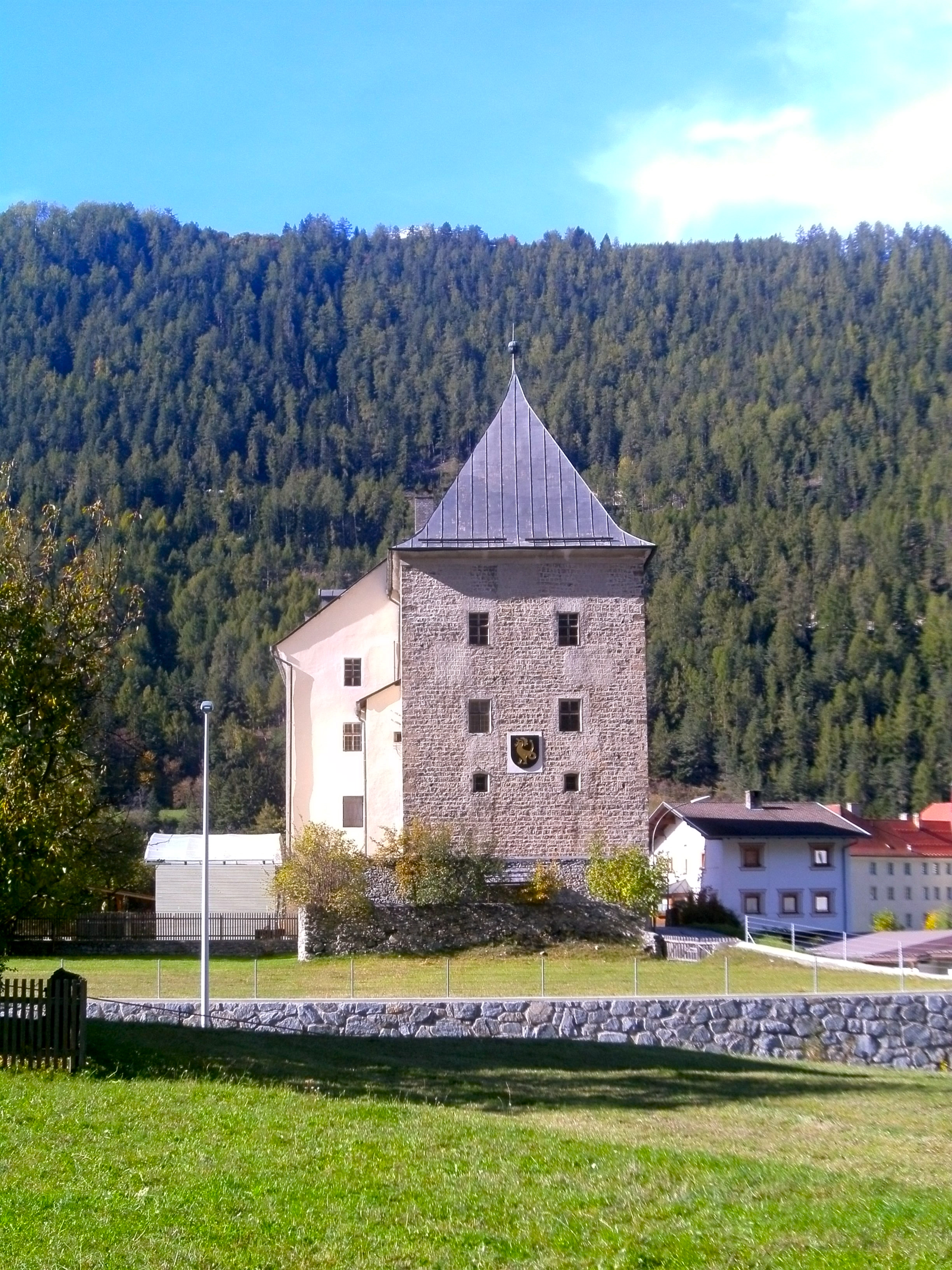 Schloss Sigmundsried von der Schulerwiese aus Dieser landesfürstliche Turm war im 13. und 14.Jahrhundert Wohnsitz der Herren von Ried; von hier aus wurde der Verkehr auf der Landstraße überwacht. 1471 ließ Erzherzog-› Sigmund ihn zum Jagdschloss Sigmundsried ausbauen.1550 verlegt der Ritter Veith von Wehingen den Gerichtsitz von Laudegg auf Sigmundsried. 1684-1775 war das Schloss im Besitz der Familie Sterzinger, die durch mehrere Generationen das Richteramt innehatte. 1841 erwarb es der Staat und baute es als Gerichtsgebäude um. Die Gerichtsverwaltung wurde damals endgültig von Laudegg nach Ried verlegt. Bis 1978 war hier ein Bezirksgericht. In der Eingangshalle des Gebäudes, das seit 1999 der Gemeinde gehört, sind schöne Ranken- und Wappenmalereien aus dem 16.Jahrhundert erhalten.